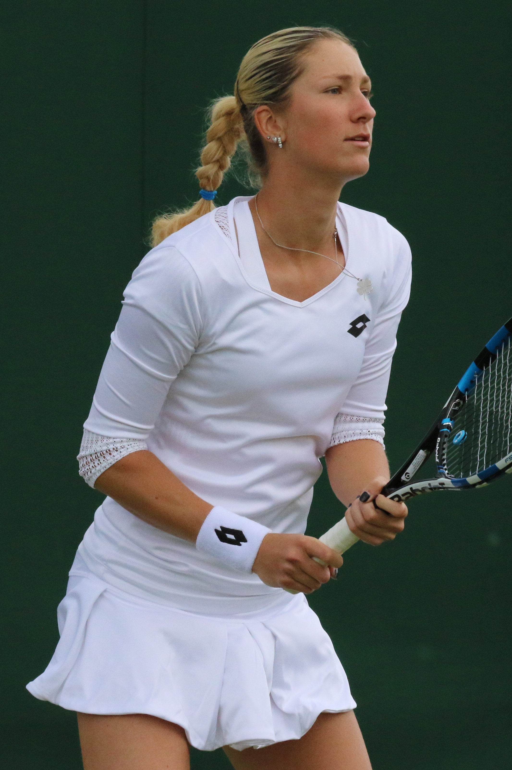 Allertova WM16 (10)